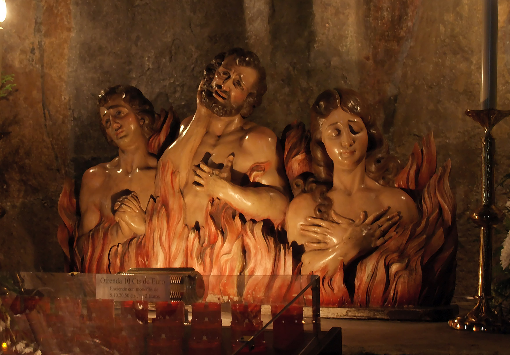 Ánimas en el Purgatorio. Iglesia conventual de San Francisco, Pontevedra.